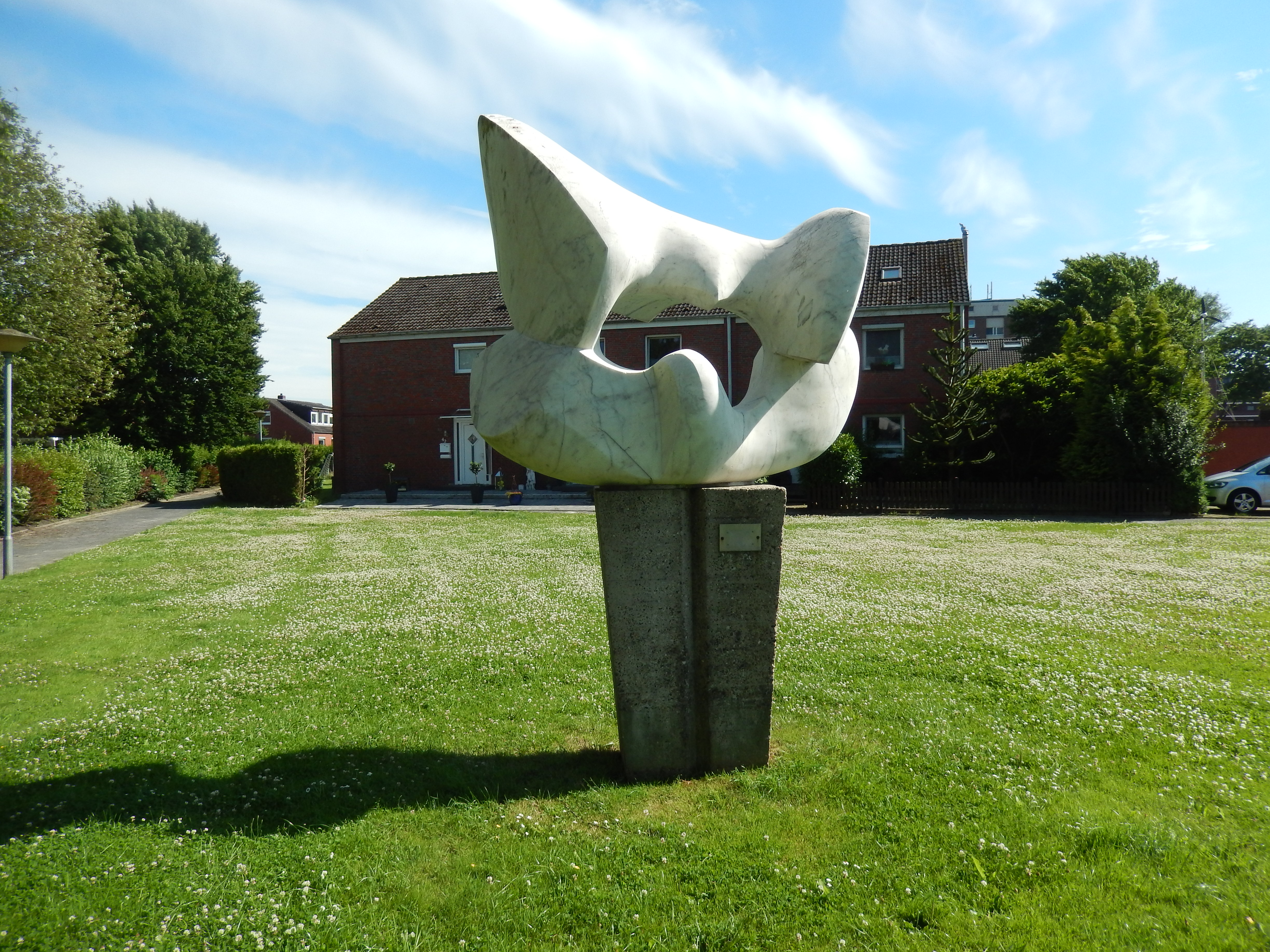 Skulptur "Möven" im Stadtviertel Wiesenhof von Wilhelmshaven